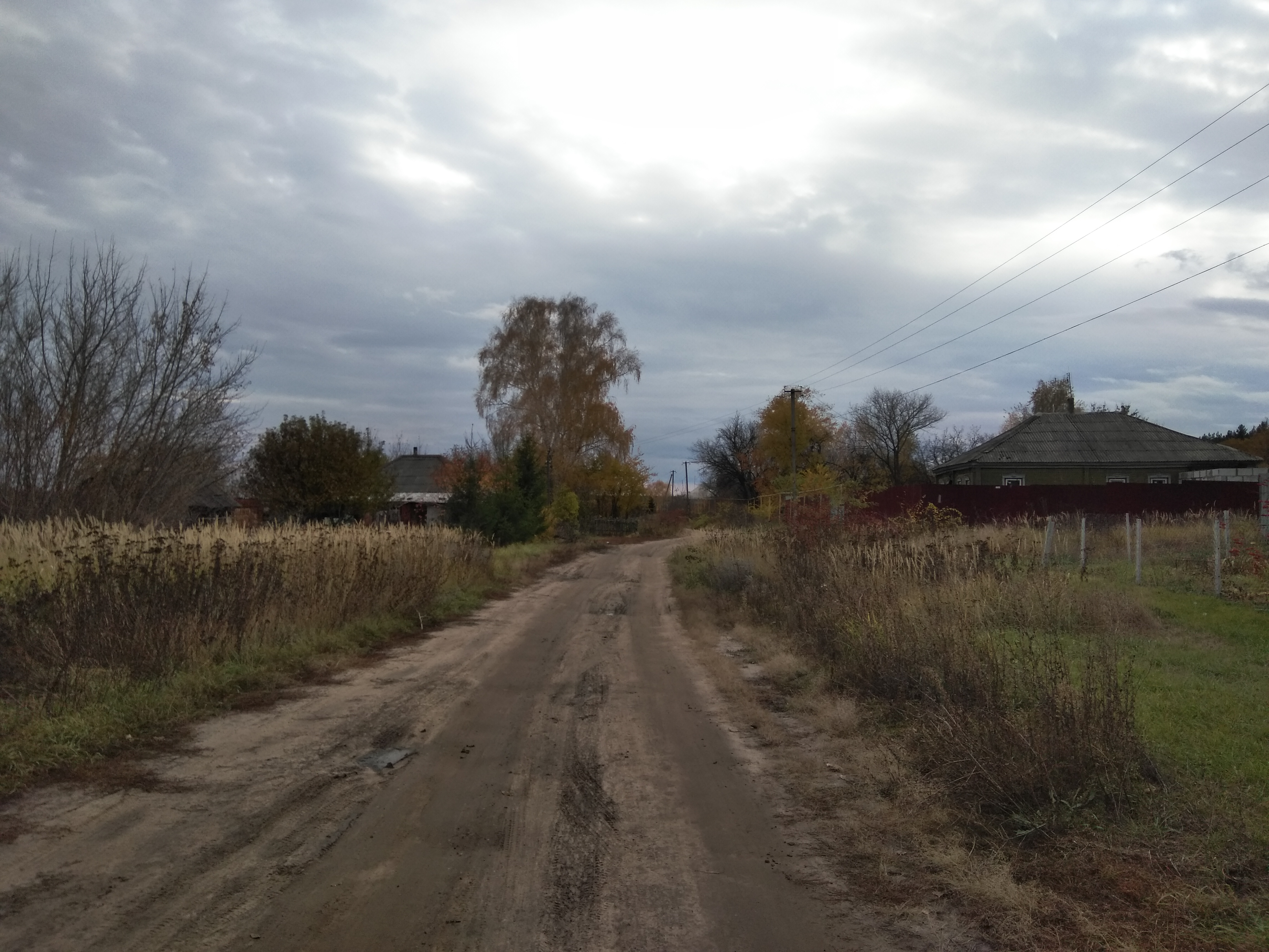 Хутор Осинки Лискинского района Воронежской области